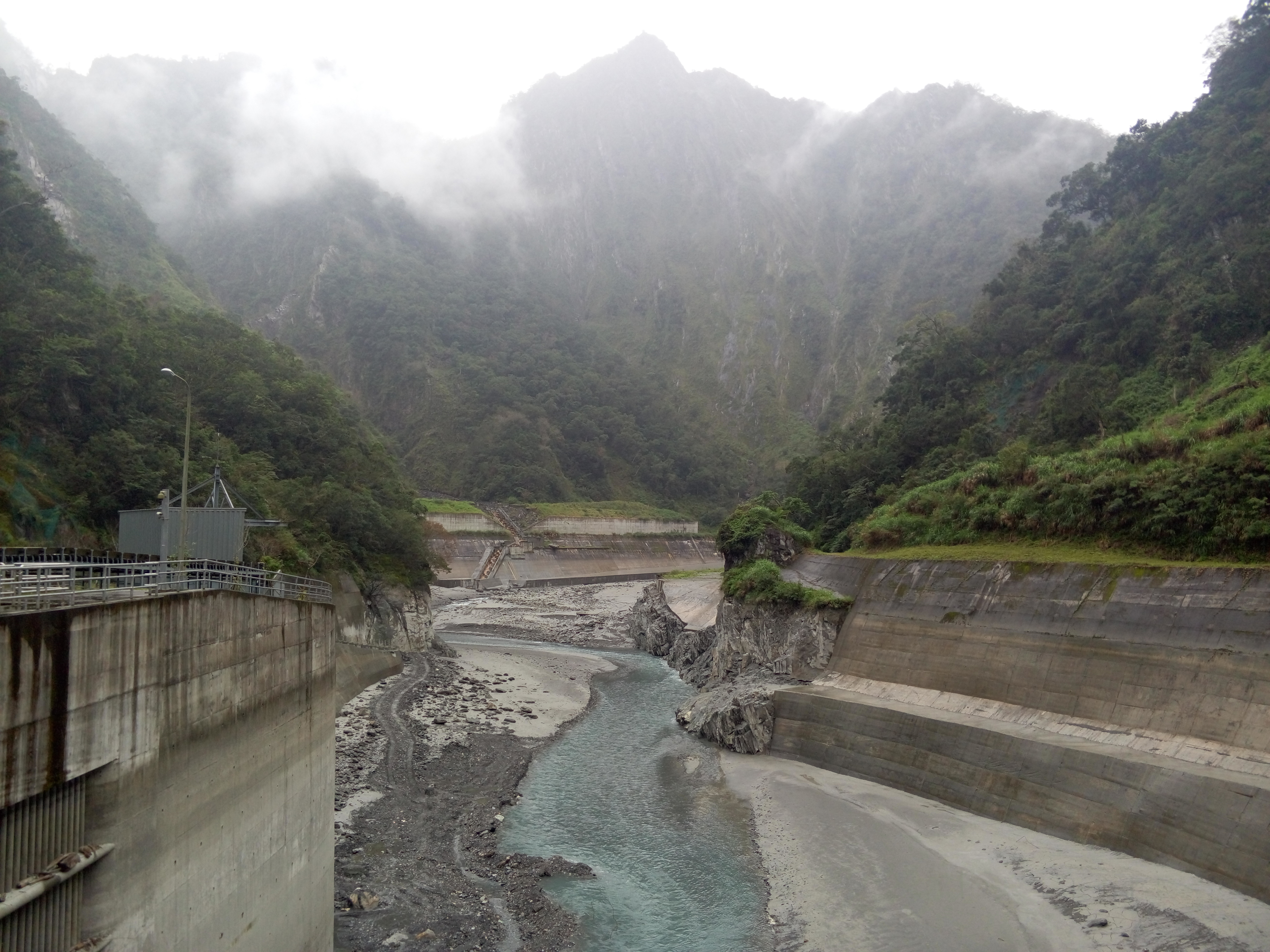 中文（台灣）: 臺灣電力公司東部發電廠碧海機組南溪壩 上游蓄水區，圖中為未蓄水的景色